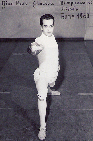 Giampaolo Calanchini